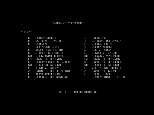 Знімок екрану редактору Мікрон для Радіо-86РК, запушеного у емуляторі Emu80